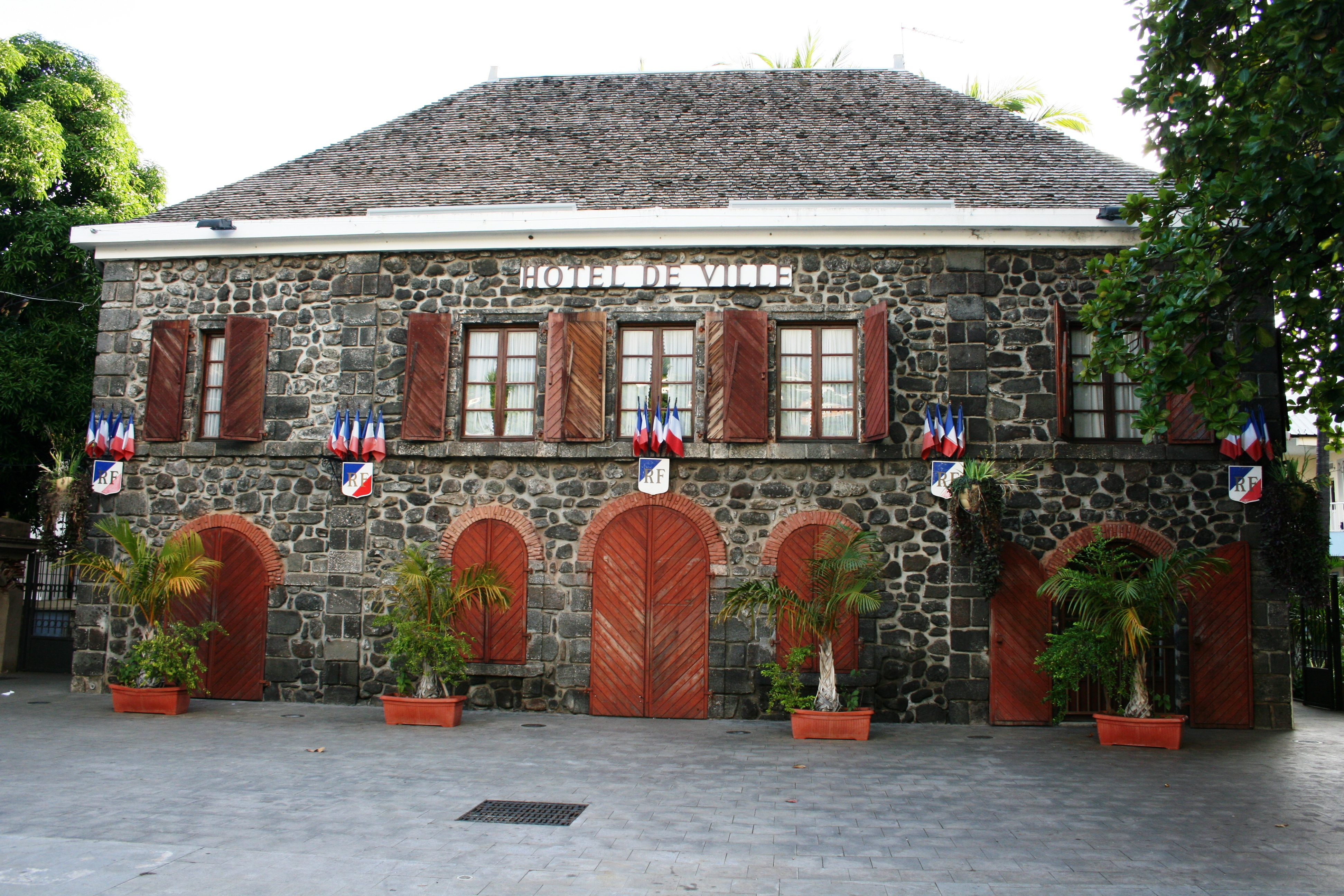 Vue de l'hôtel de ville de Saint-Leu de La Réunion.